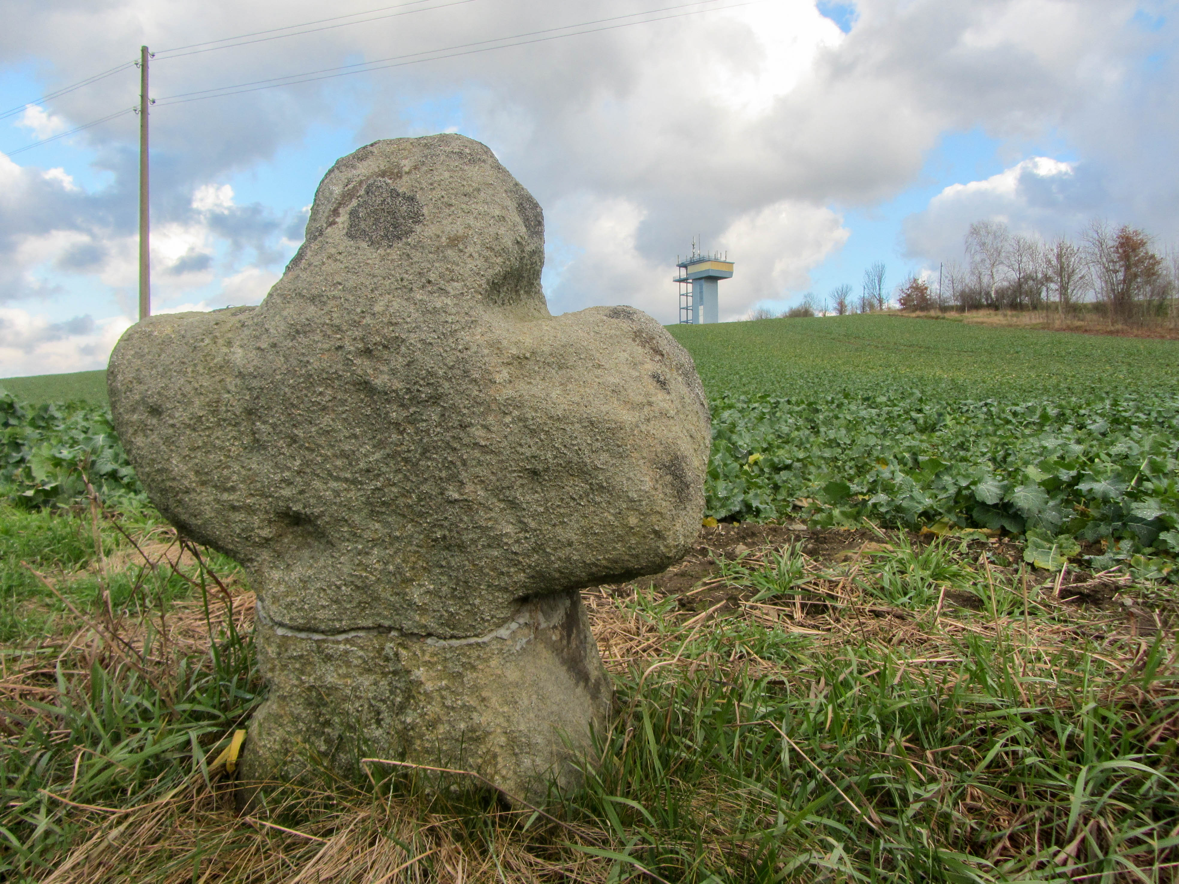 Sühnekreuz Großerkmannsdorf